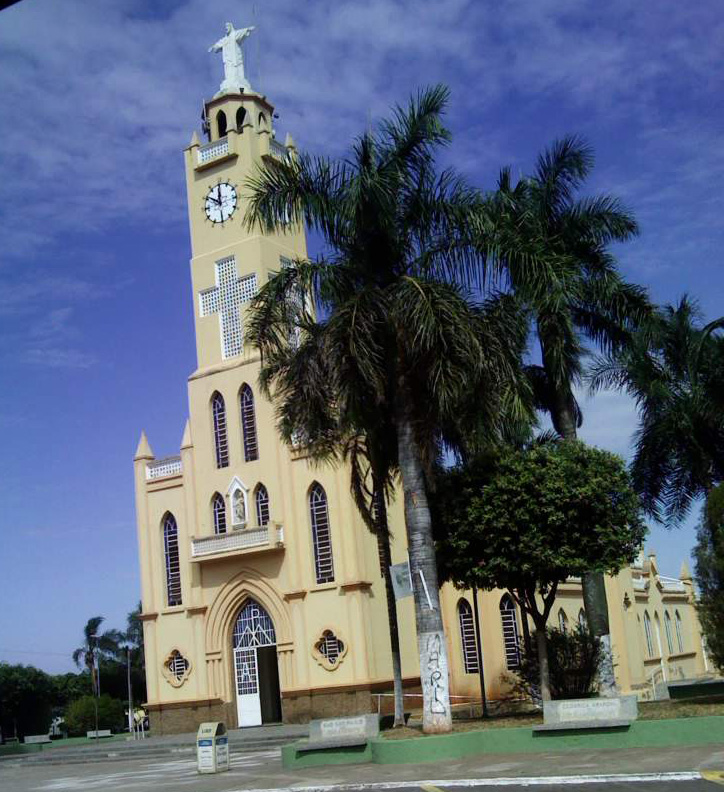 Igreja Matriz de Avanhandava